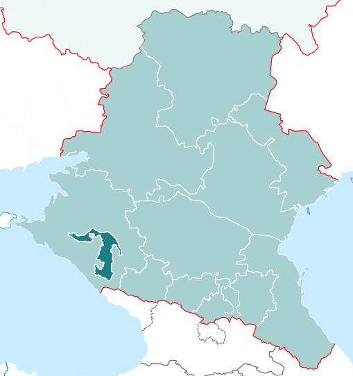 Adõgee Vabariigi asukoht Lõuna föderaalringkonna kaardil.